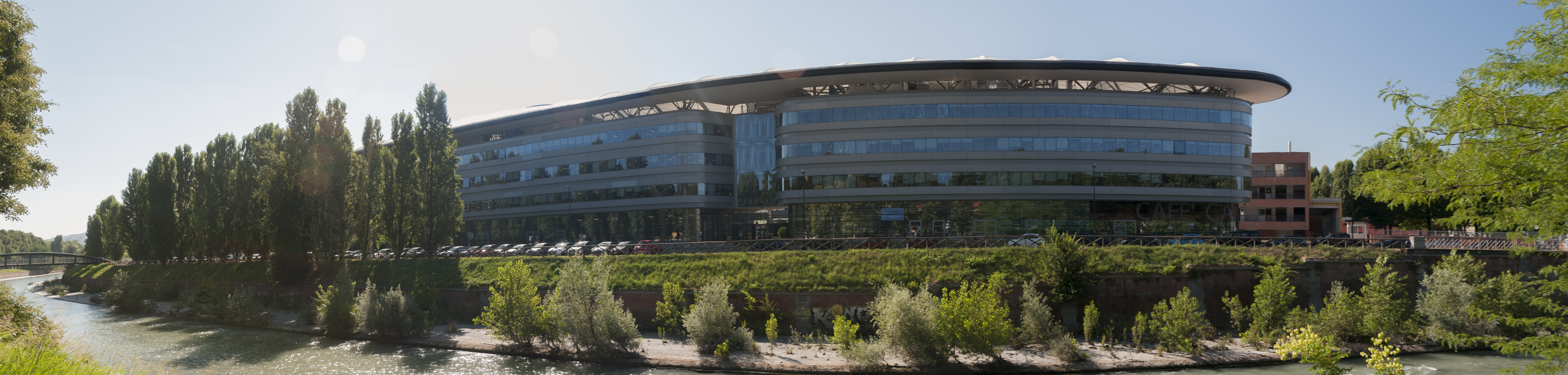 Campus Luigi Einaudi Torino